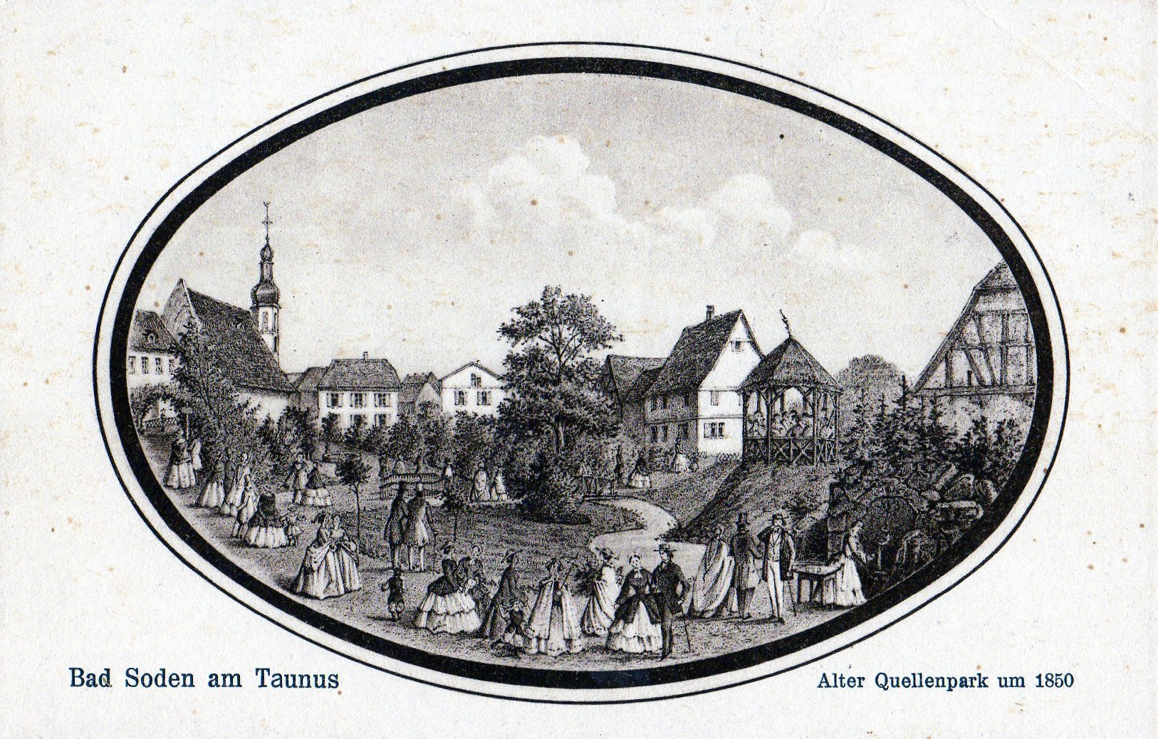 eine Alte Ansichtskarte aus den 1930 mit dme Abbild des Quellenparks um 1850